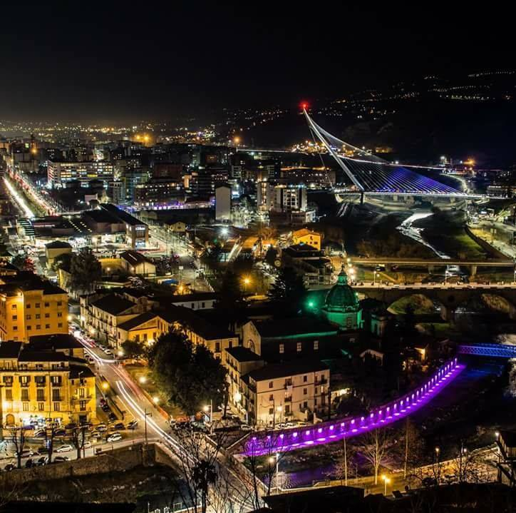 Veduta panoramica notturna di Cosenza dal centro storico .